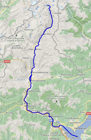 Carte réalisée sur umap This map may be incomplete, and may contain errors. Don't rely solely on it for navigation.